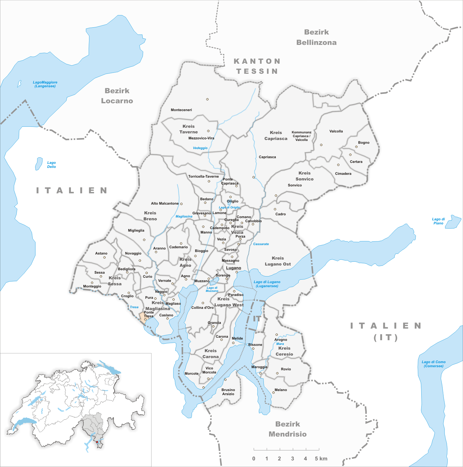 Municipality Ponte Tresa